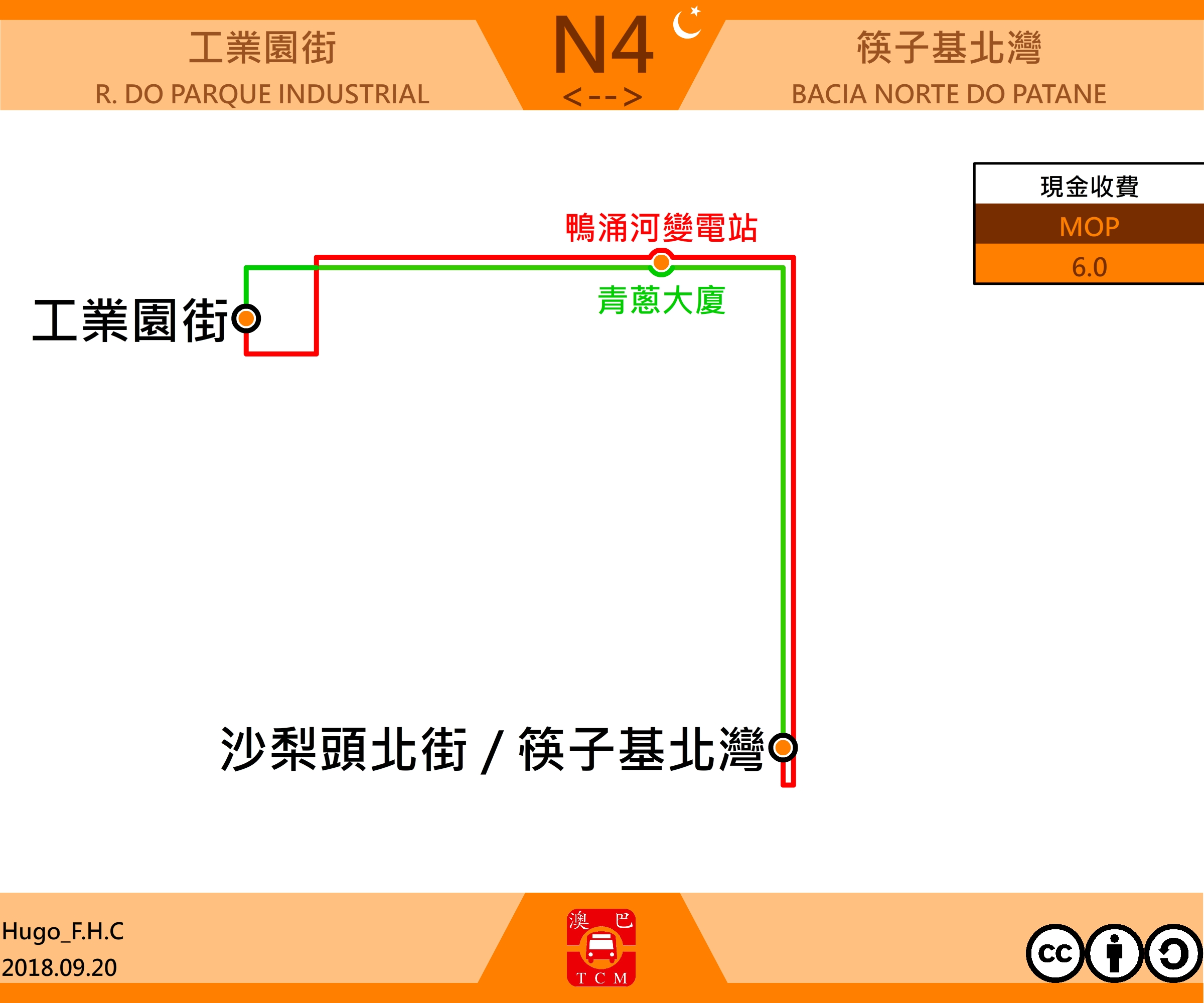 澳門巴士N4走線圖